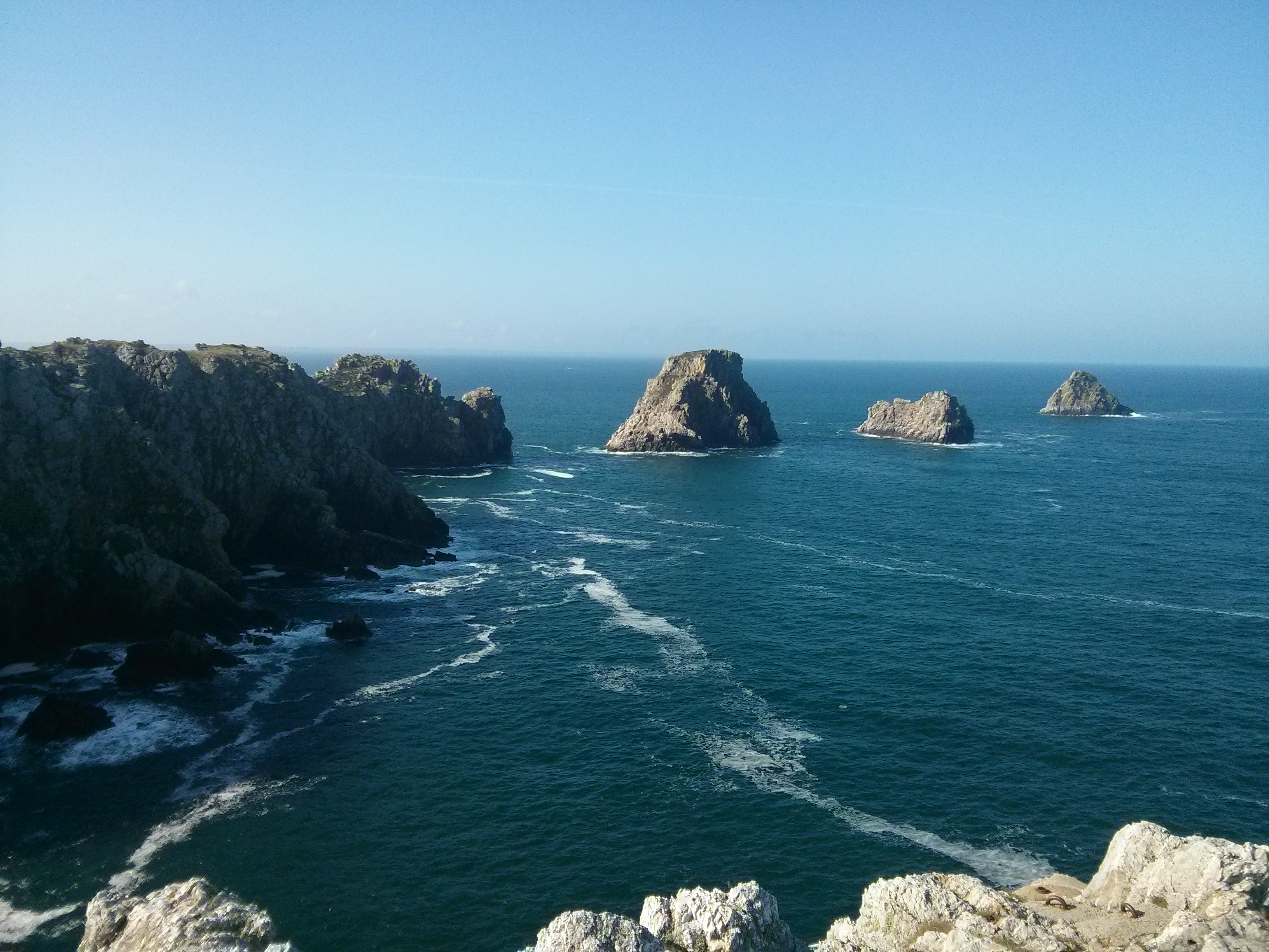 Îlots "Tas de Pois", pointe de Pen Hir, Camaret-sur-Mer (Finistère, France)